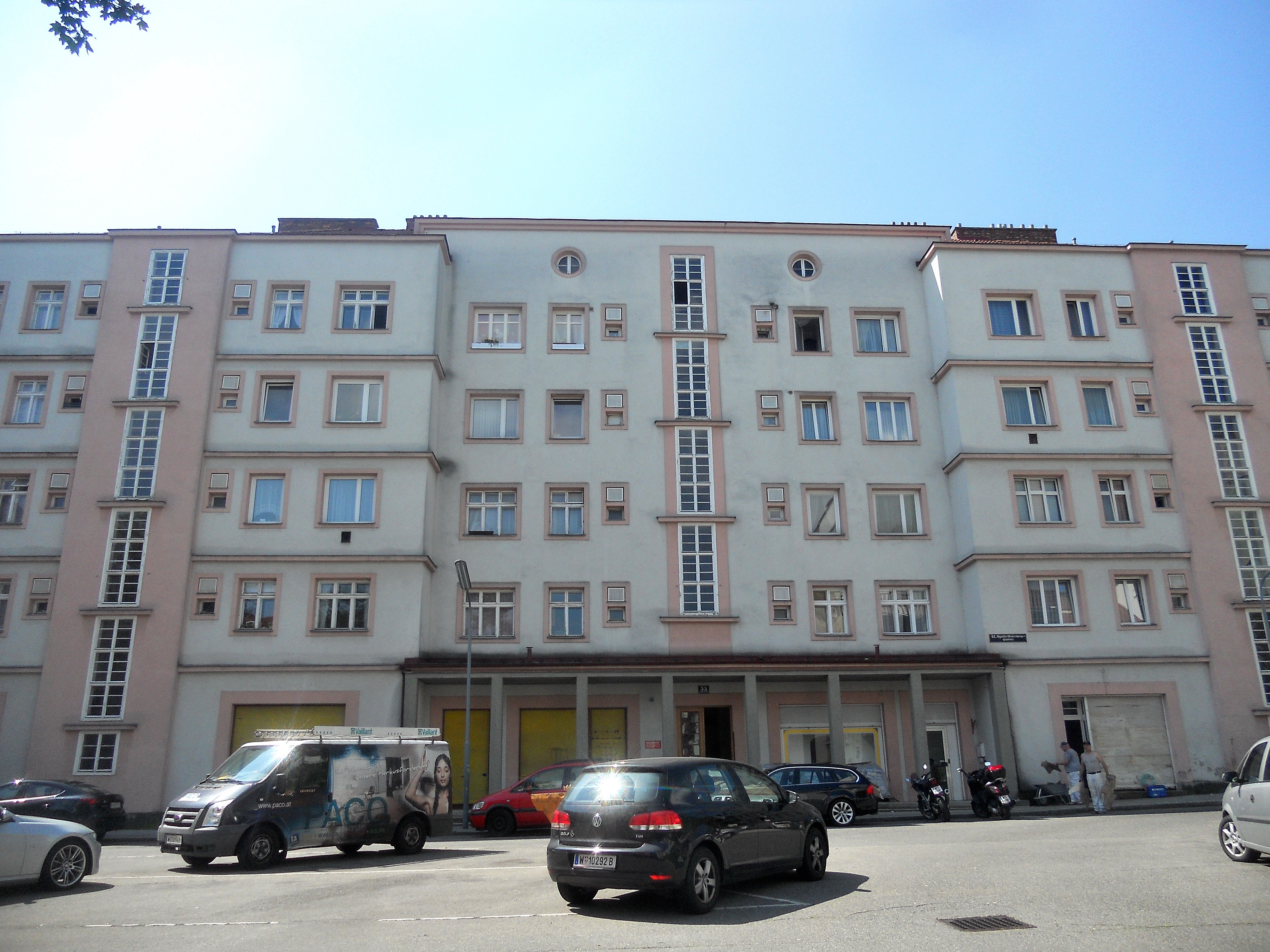 Der mittlere Block des "Indianerhofes" (auch "Theerhof" genannt) von der Spittelbreitengasse aus This media shows the Vienna residential building (Gemeindebau) with the ID 925.